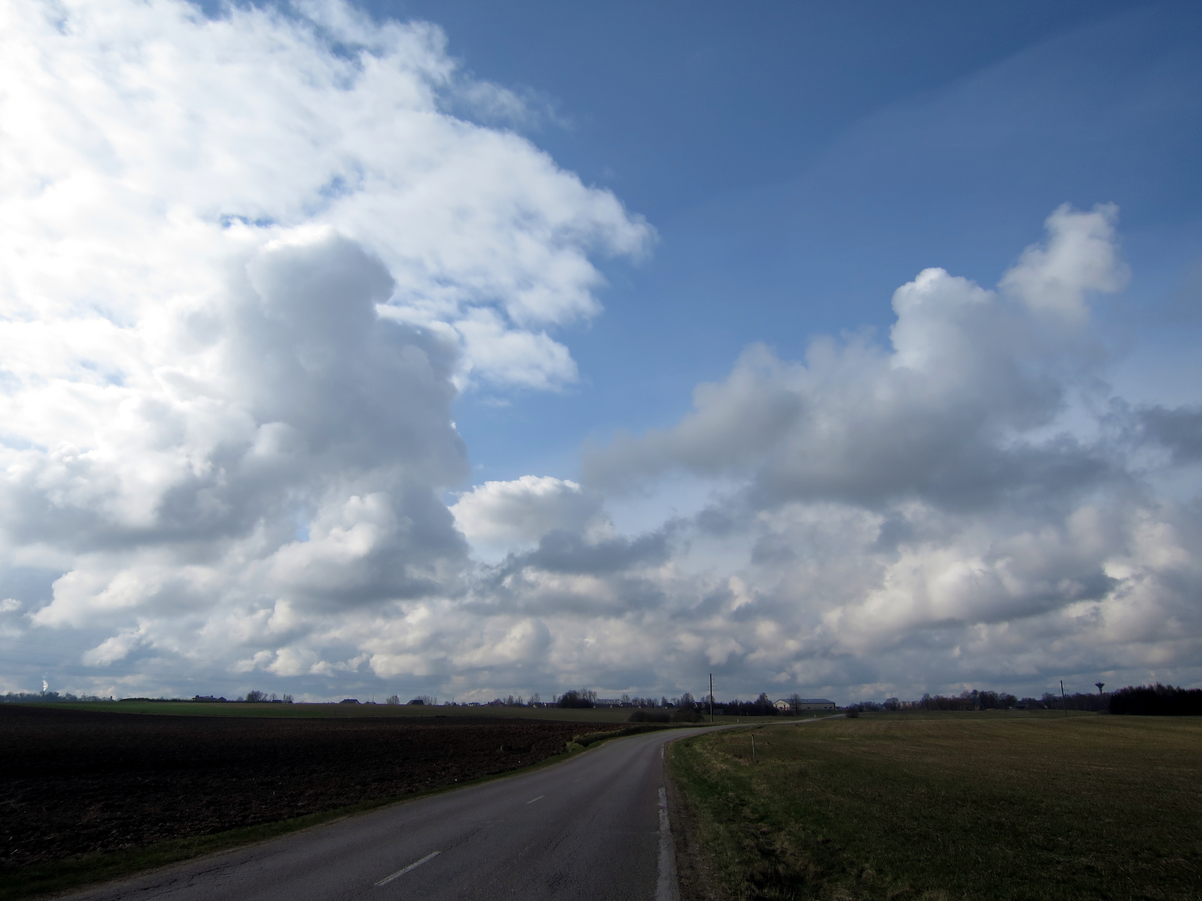 Mākoņi Saldus pagastā, netālu no Saldus. Autoceļš V1430.